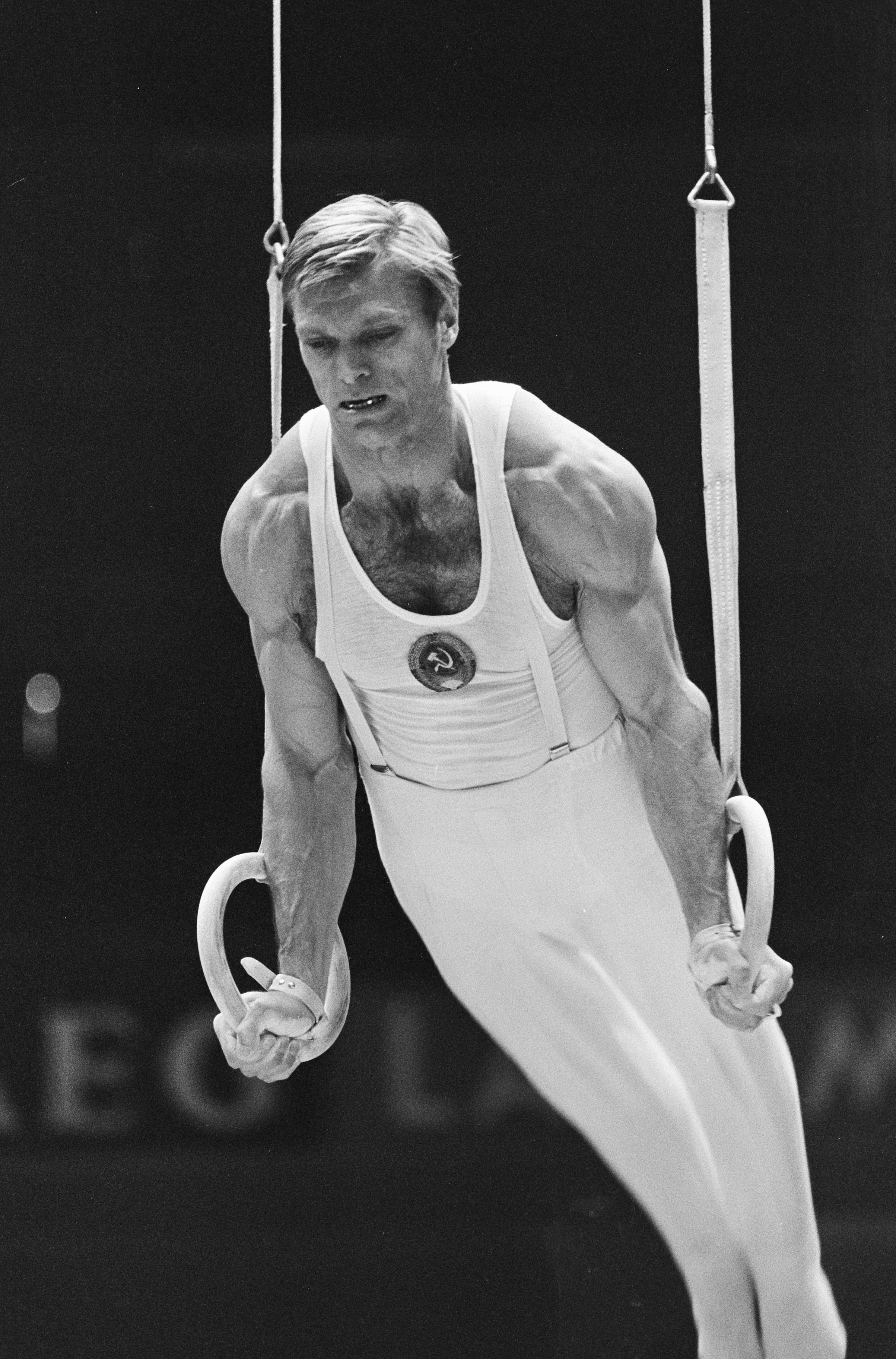 Collectie / Archief : Fotocollectie Anefo Reportage / Serie : Wereldkampioenschappen turnen 1966 in Dortmund Beschrijving : De Russische Boris Chaklin in aktie aan de ringen Datum : 22 september 1966 Locatie : Dortmund, West-Duitsland Trefwoorden : sport, turnen Persoonsnaam : Chaklin, Boris Fotograaf : Ron Kroon / Anefo Auteursrechthebbende : Nationaal Archief Materiaalsoort : Negatief (zwart/wit) Nummer archiefinventaris : bekijk toegang 2.24.01.05 Bestanddeelnummer : 919-5889